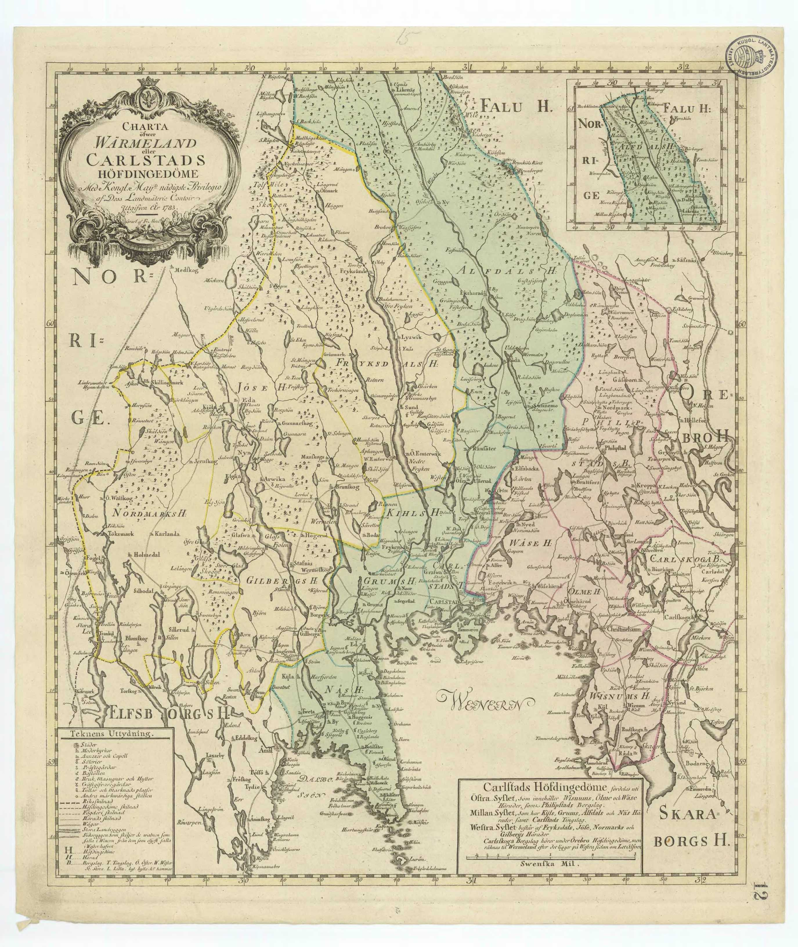 Generalkarta över Värmland, skapad 1783 av Kungliga Lantmäteriet.